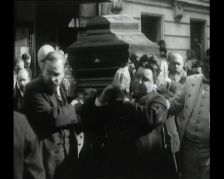 выкадровка из кинопленки 1924 г., заснявшей похороны Н.Н.Кутлера - члена Правления Госбанка.